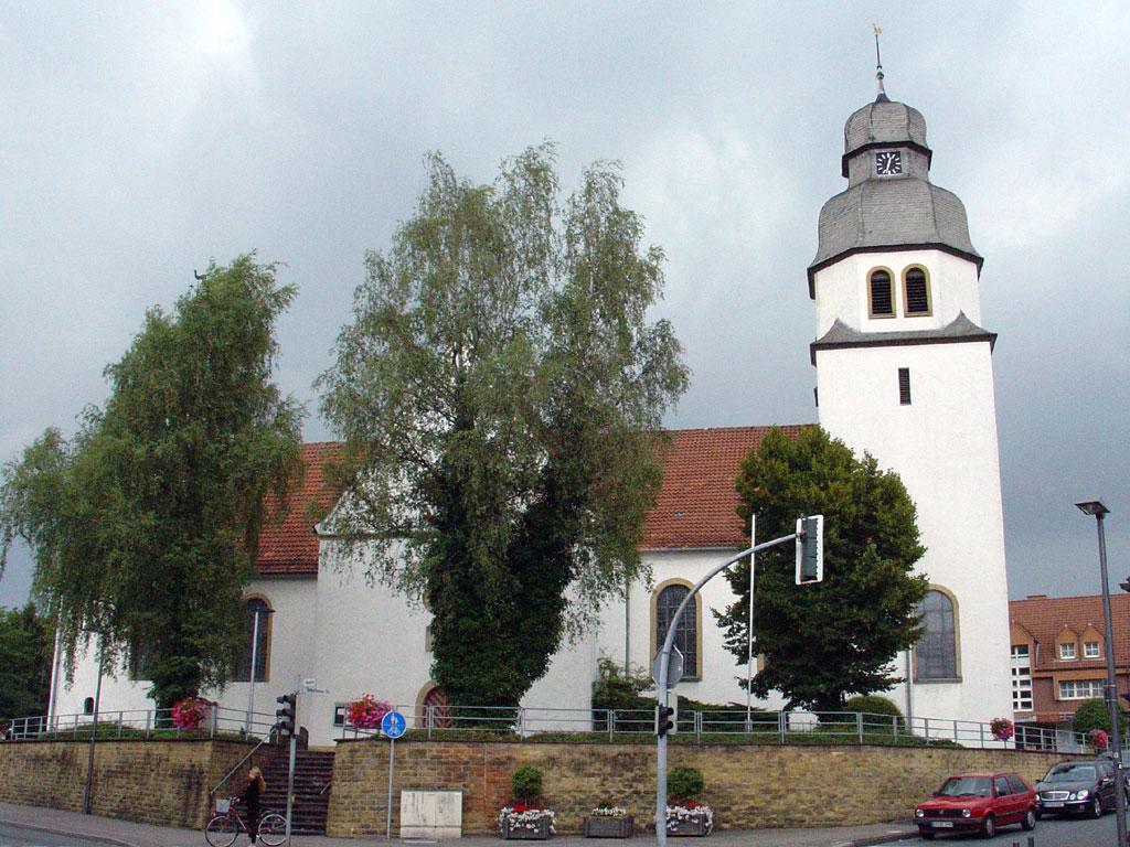 St. Johannes Baptist in Stuckenbrock